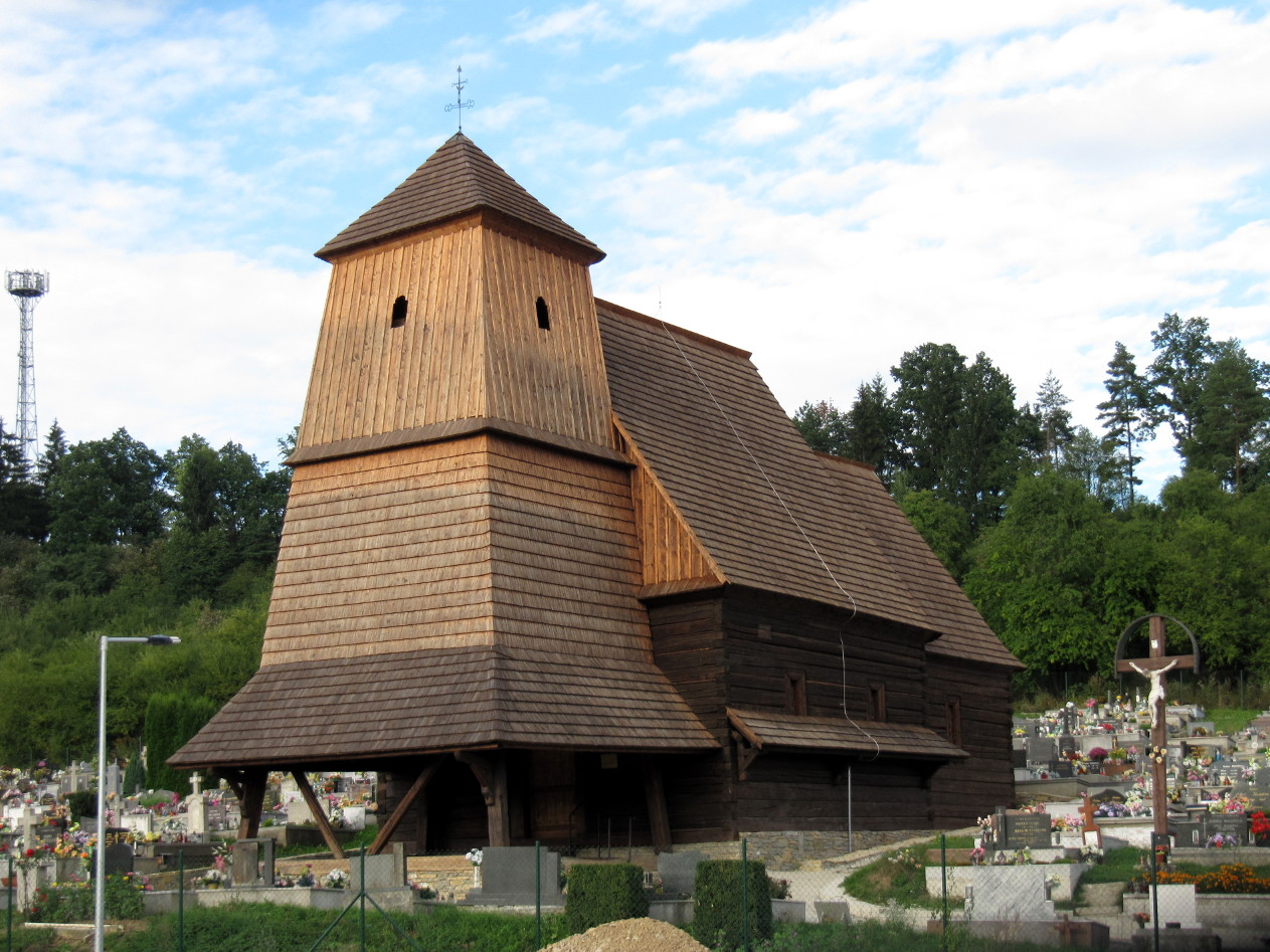 Kostol drevený